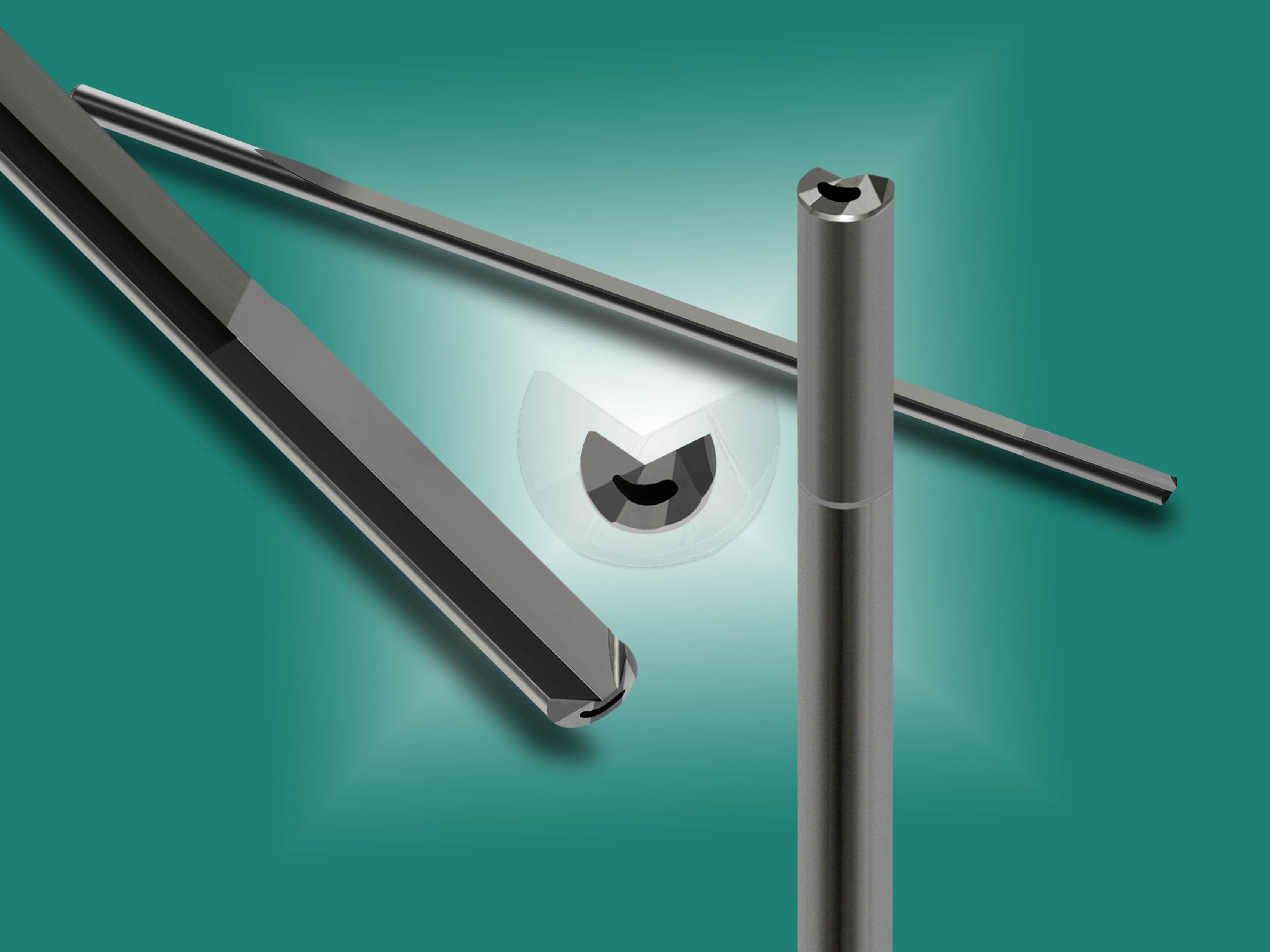 VHM-Einlippentiefbohrer